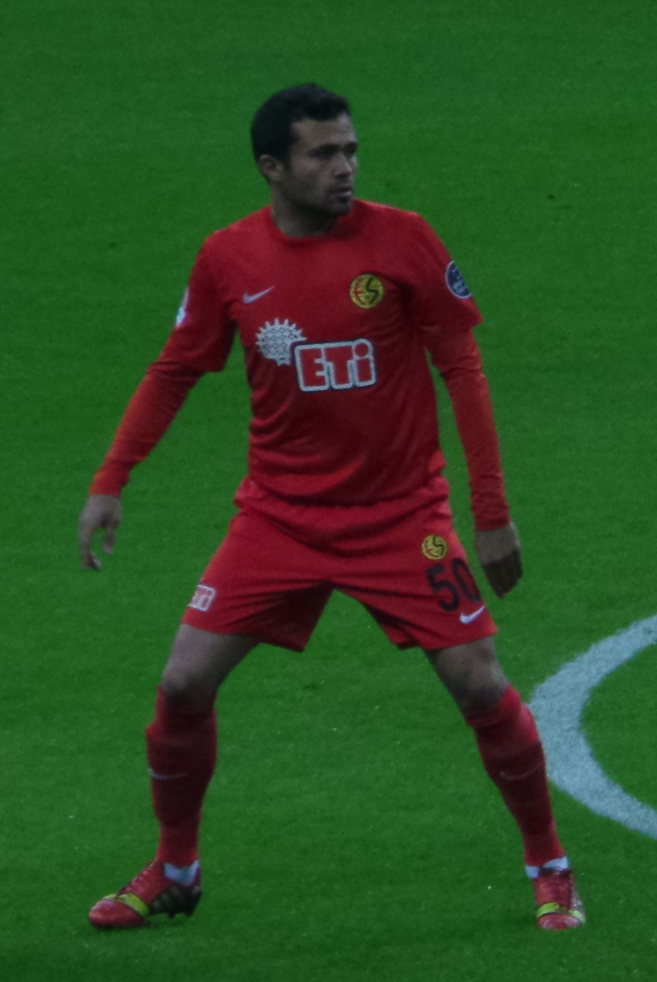 Hürriyet Gücer'14